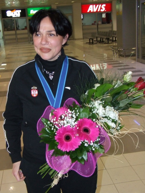 Јасна Шекарић на повратку са Европског првенства у гађању ваздушним оружјем у Меракеру (Норвешка), где је са репрезентацијом СРбије у пиштољу освојила златну медаљу. Београд, 15.3.2010.